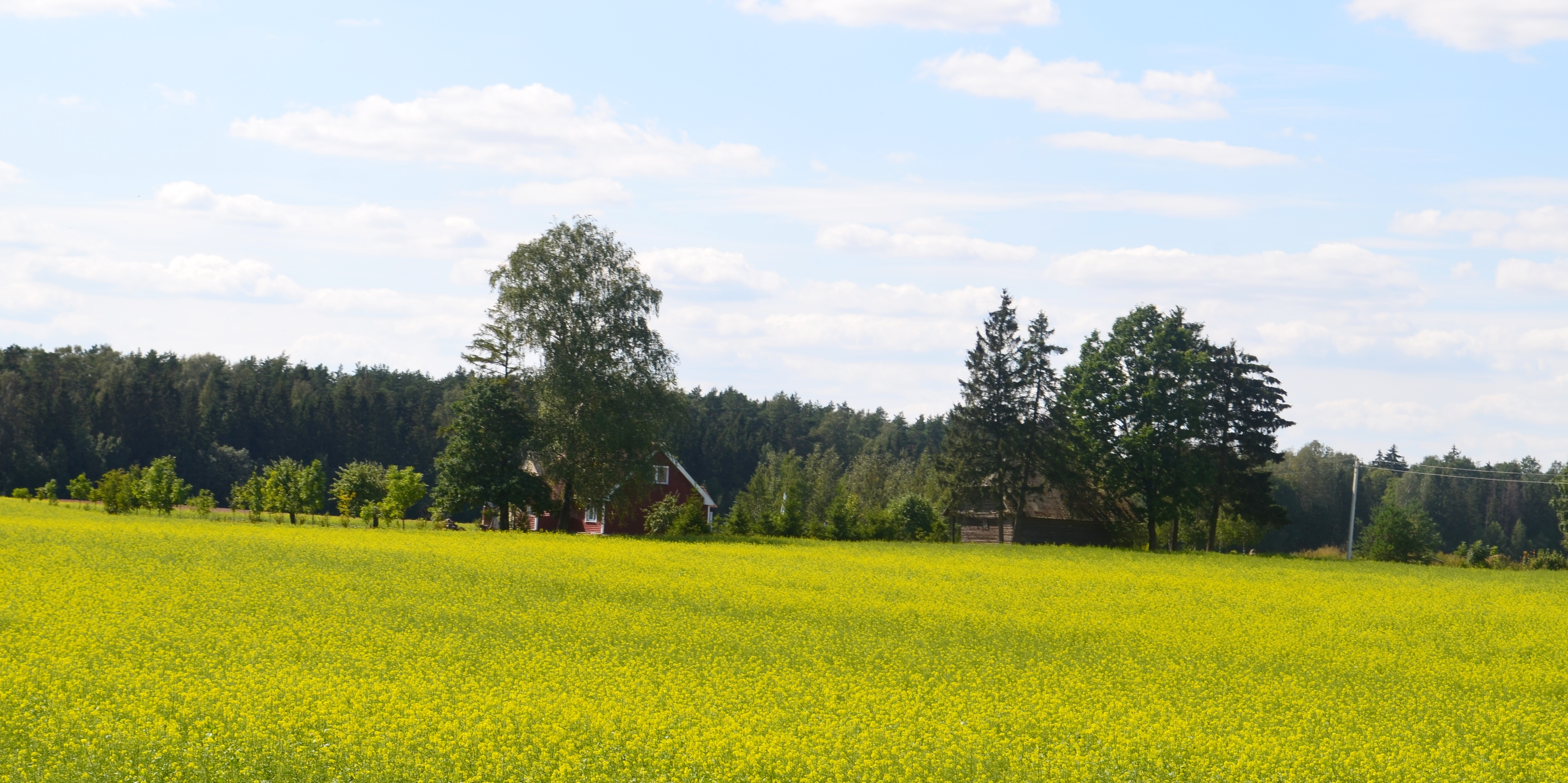 Kupsčiai, Kėdainių raj.